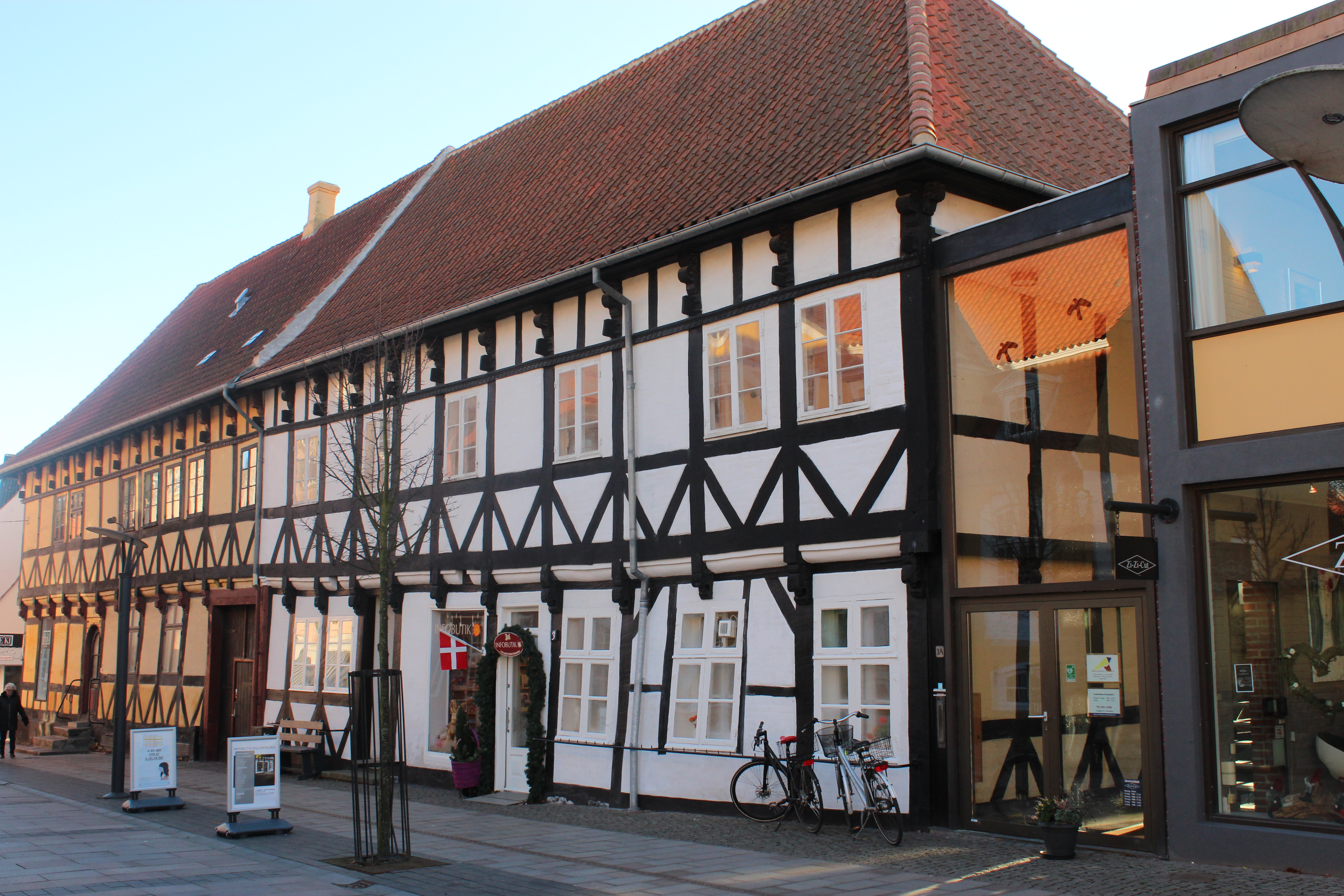 Fredet bindingsværksbygning i Kalundborg.